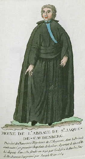 Collection de costumes de tous les ordres monastiques, supprimés à differentes époques, dans la ci-devant Belgique, Bruxelles, Philippe Joseph Maillart et sœur, 1811